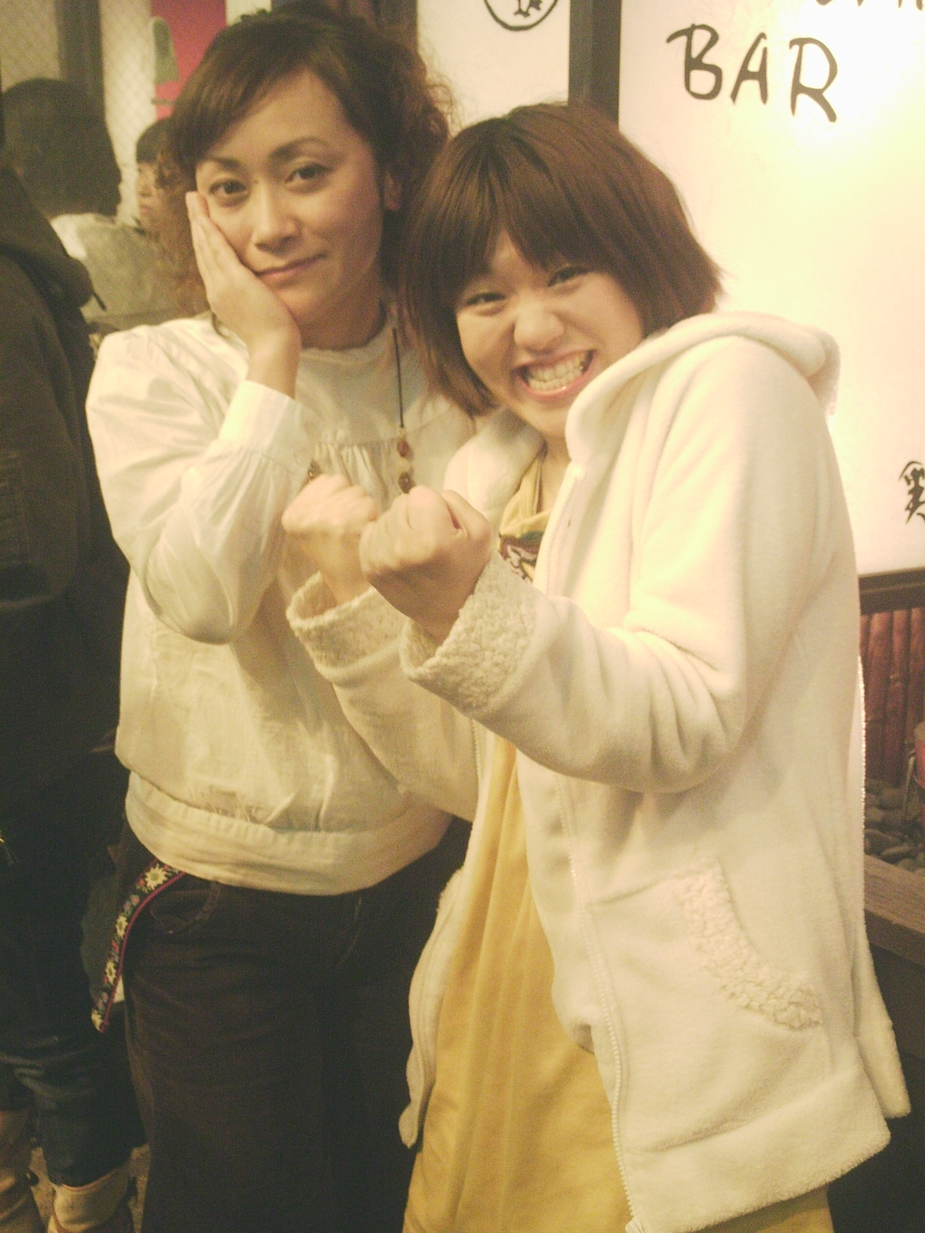 麦芽 (お笑いコンビ 2009年12月)